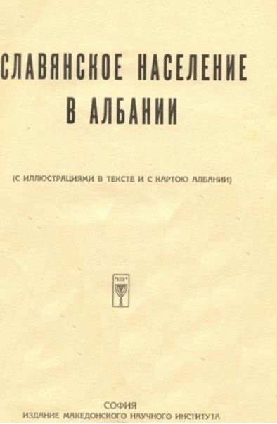 "Славянское население в Албании"